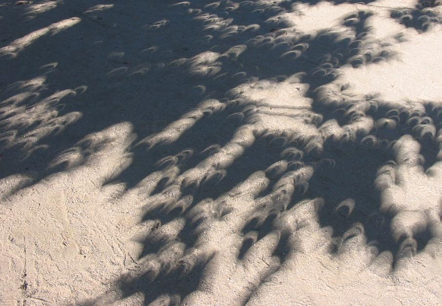 Sombra del Eclipse anular. Fotografía de Pablo Alberto Salguero Quiles